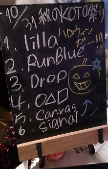 amiinaセトリボード(20151031(1))